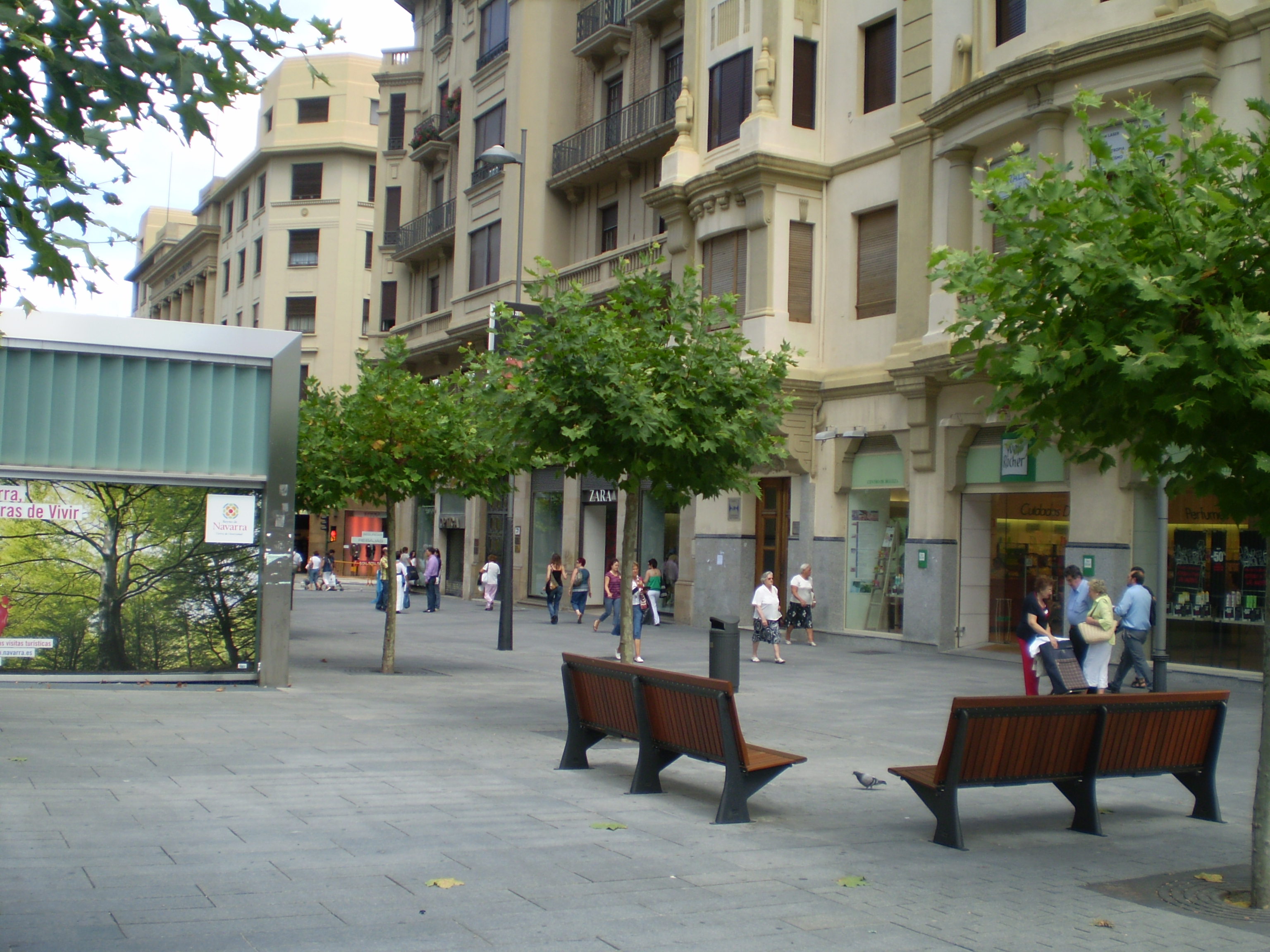 Vista de la Avenida Carlos III de Pamplona (Navarra-España)